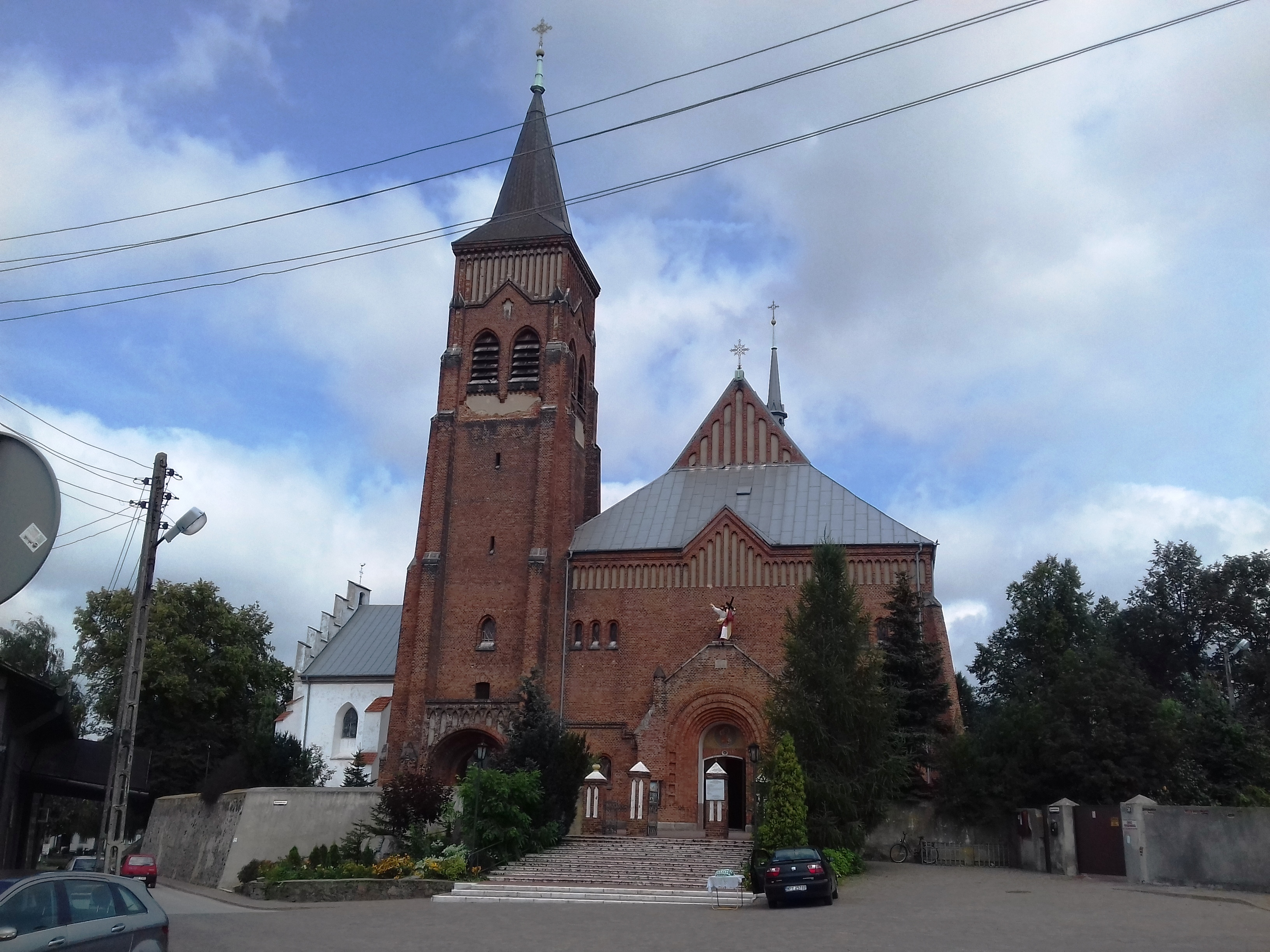 Jeżów (gm. Jeżów, pow. Brzeziny) - kościół Św. Józefa Oblubieńca NMP